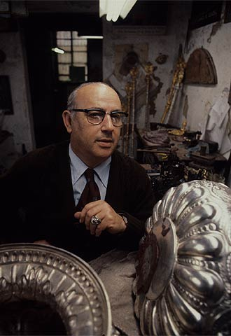 Fotografía del orfebre Fernando Marmolejo Camargo (1915-2006), que es propiedad de su hijo y digitalizada y subida a Commons por él.